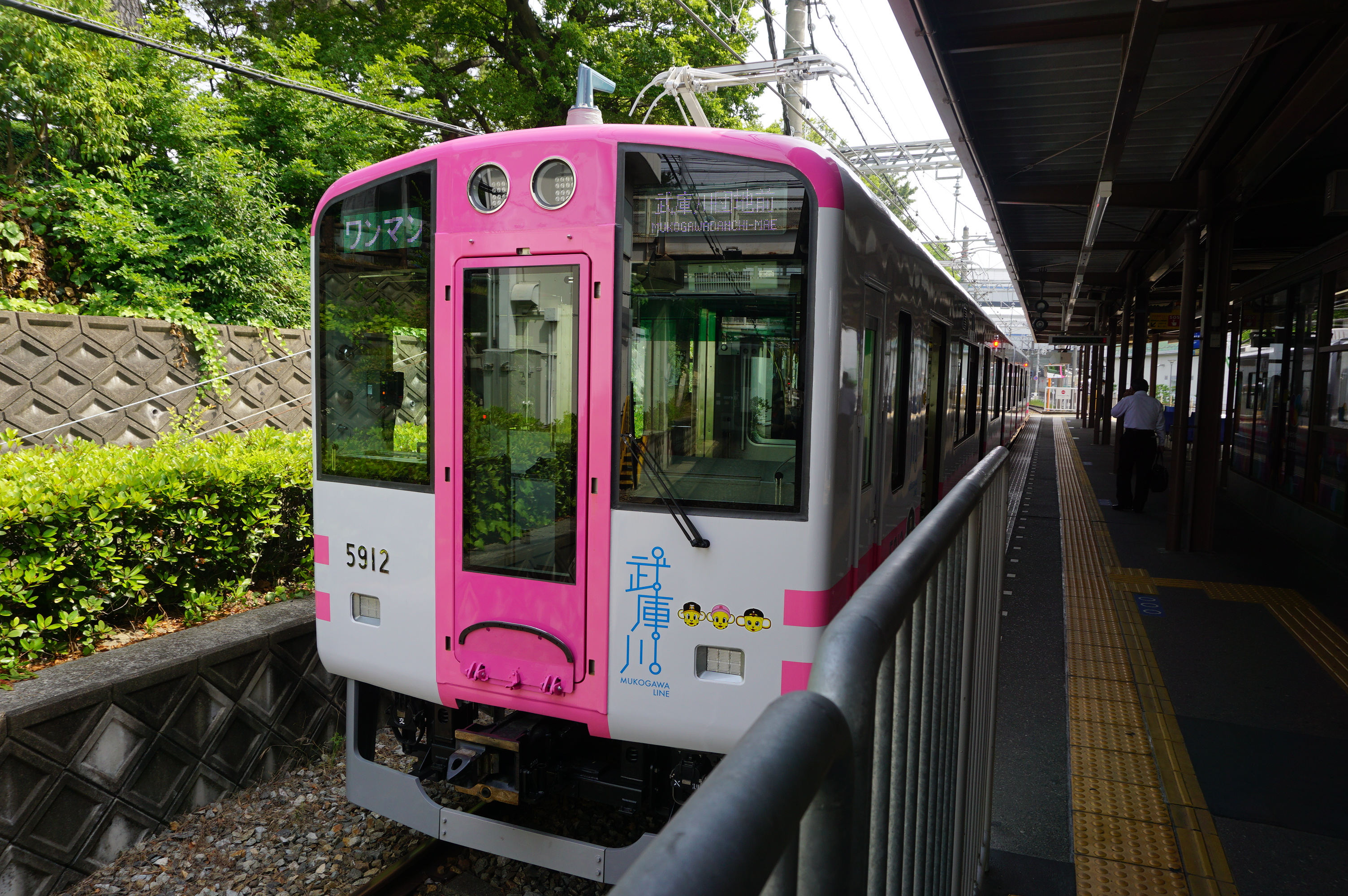 これは改造先頭車